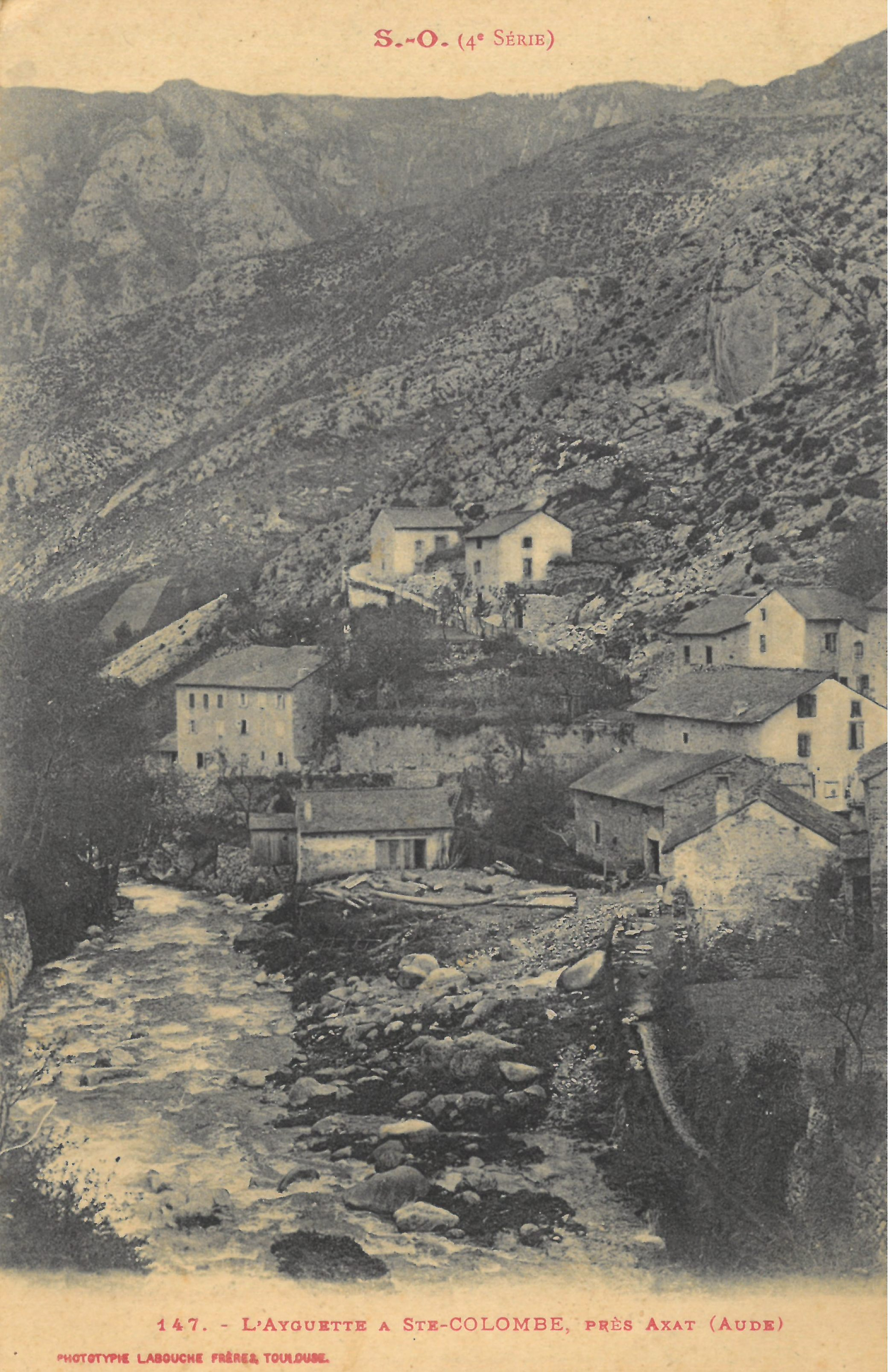 Sainte-Colombe-sur-Guette : L'Ayguette. Carte postale envoyée le 20 août 1934. Phototypie Labouche Frères, Toulouse.